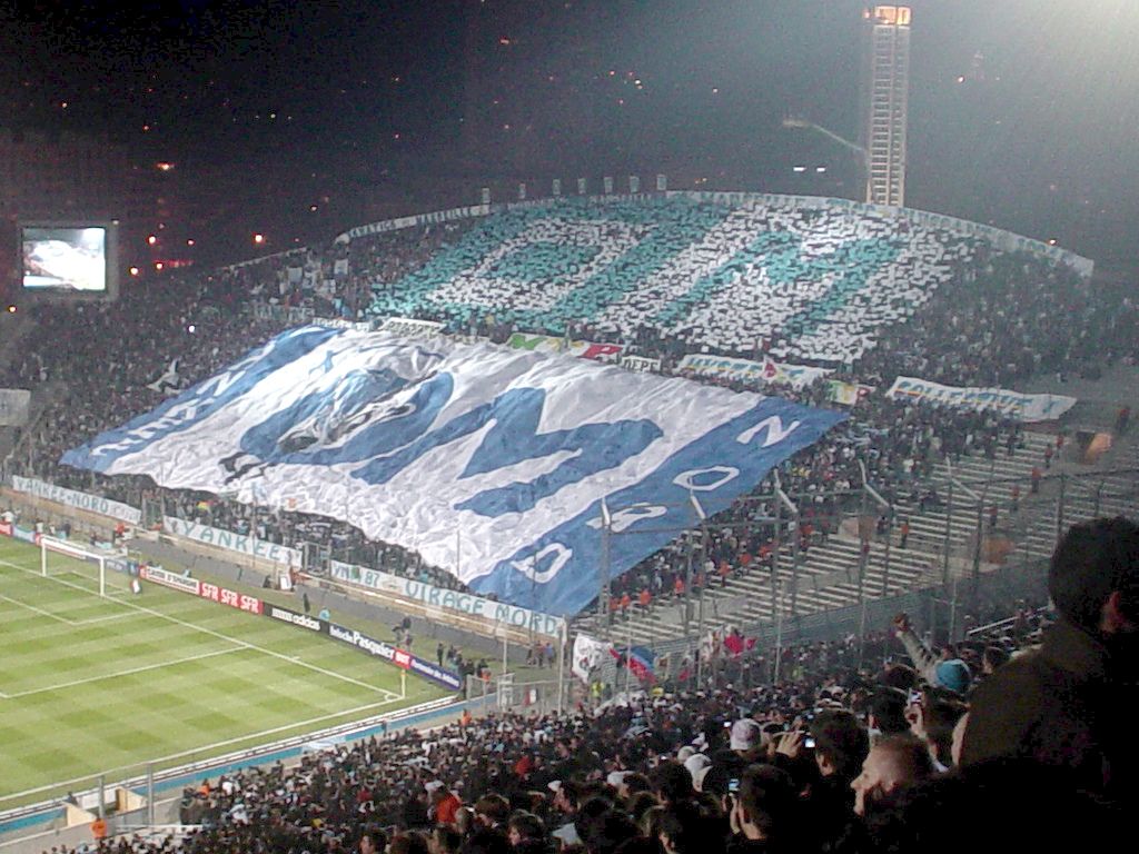 Tribune du Stade Velodrome lors de OM-OL